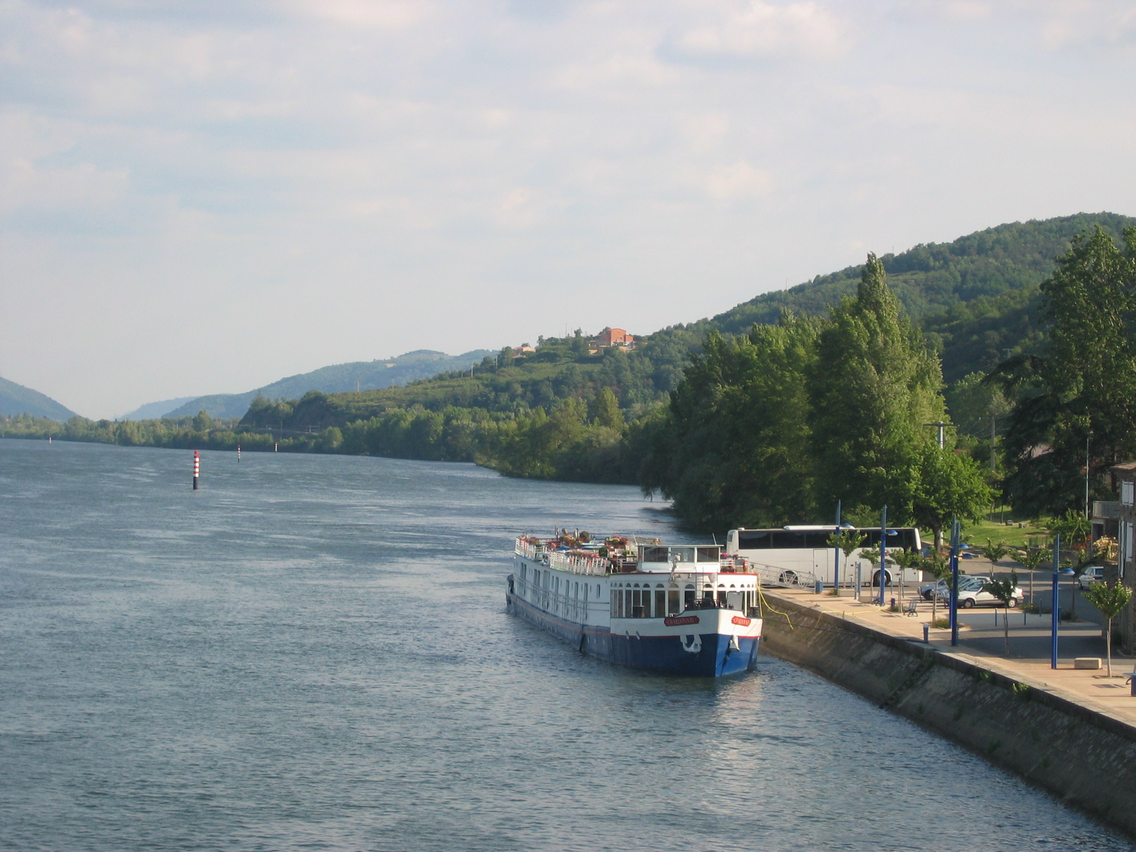 Andance vue générale et détails